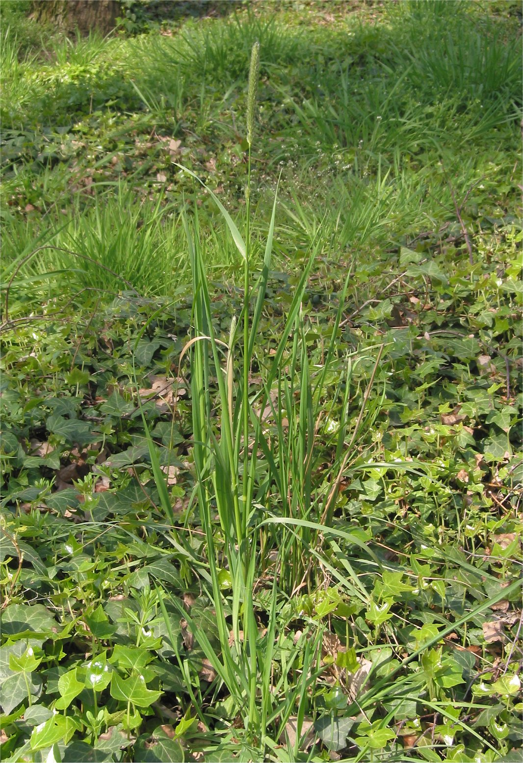 Alopecurus pratensis (Grote vossenstaart)